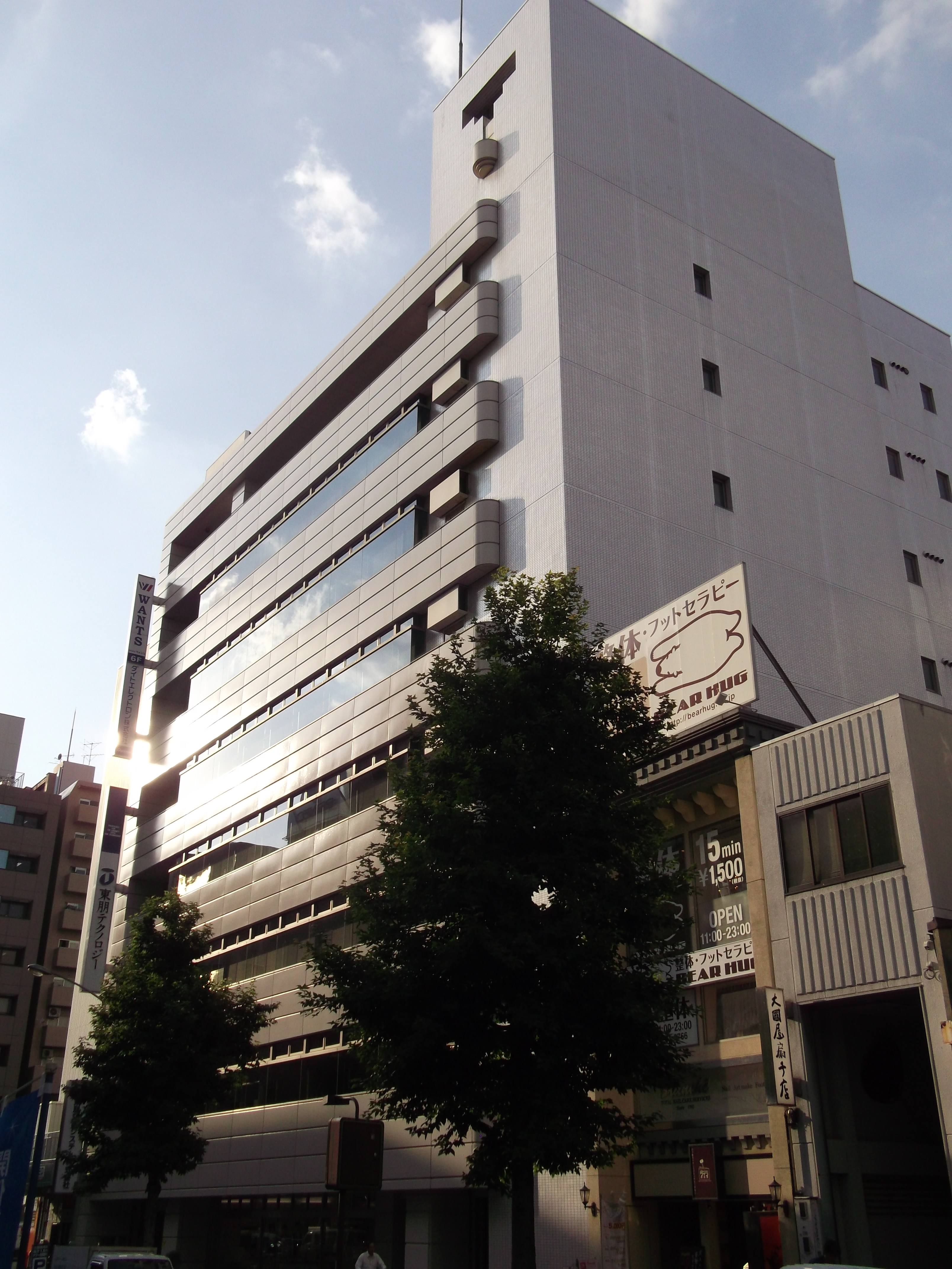 名古屋市中区の東朋ビルを南側公道東側より撮影